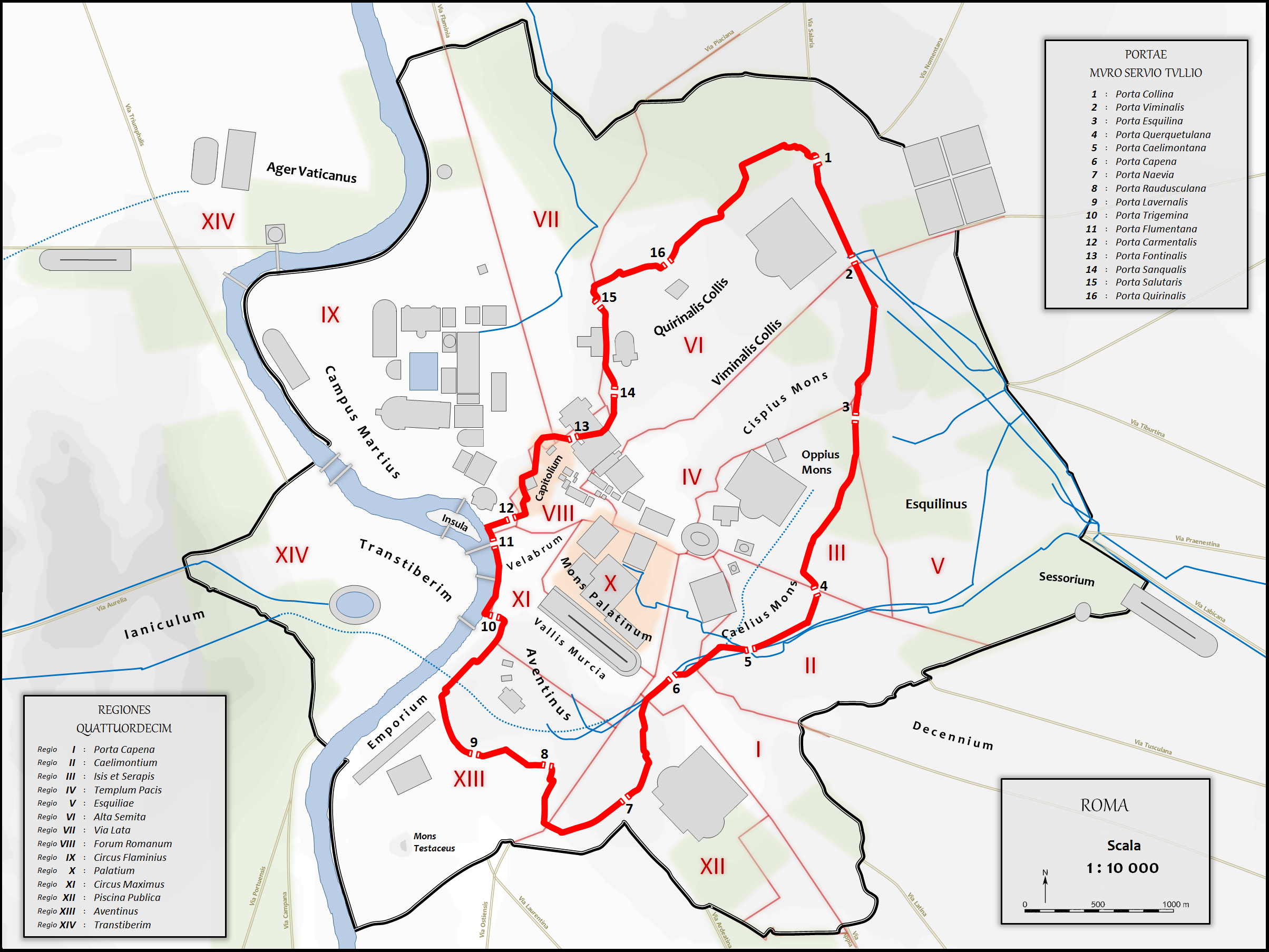 L'enceinte servienne sur le plan de la Rome antique